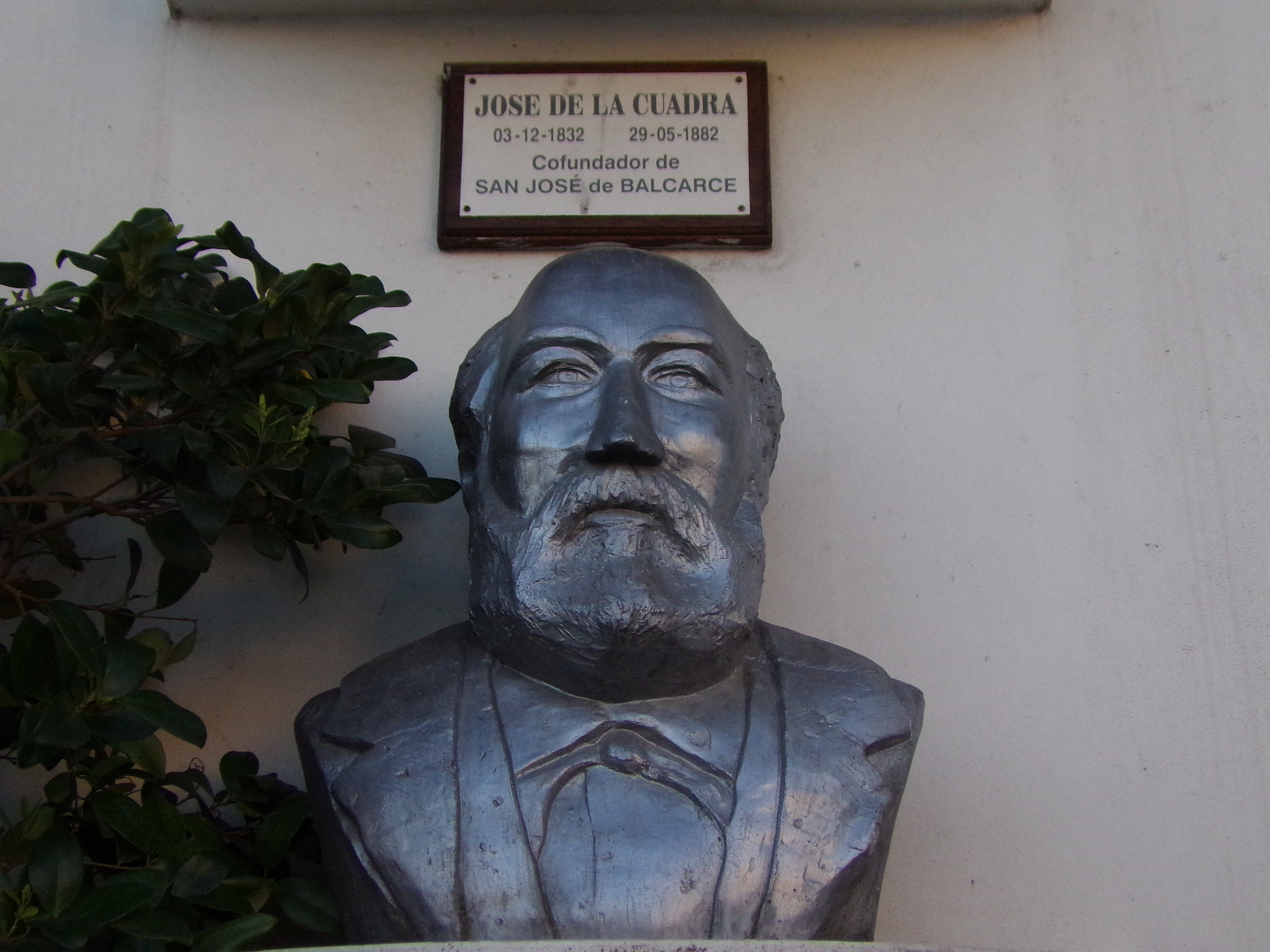 busto de Jose De La Cuadra ubicado en la biblioteca Pizzurno en calle 15 esq 20